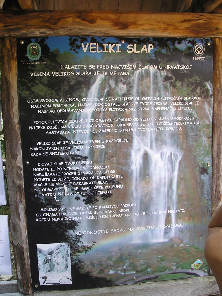 Veliki slap - Plitvička jezera